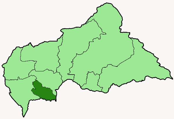 Mappa della diocesi cattolica di Mbaiki, nella Repubblica Centrafricana. Anno 2009.